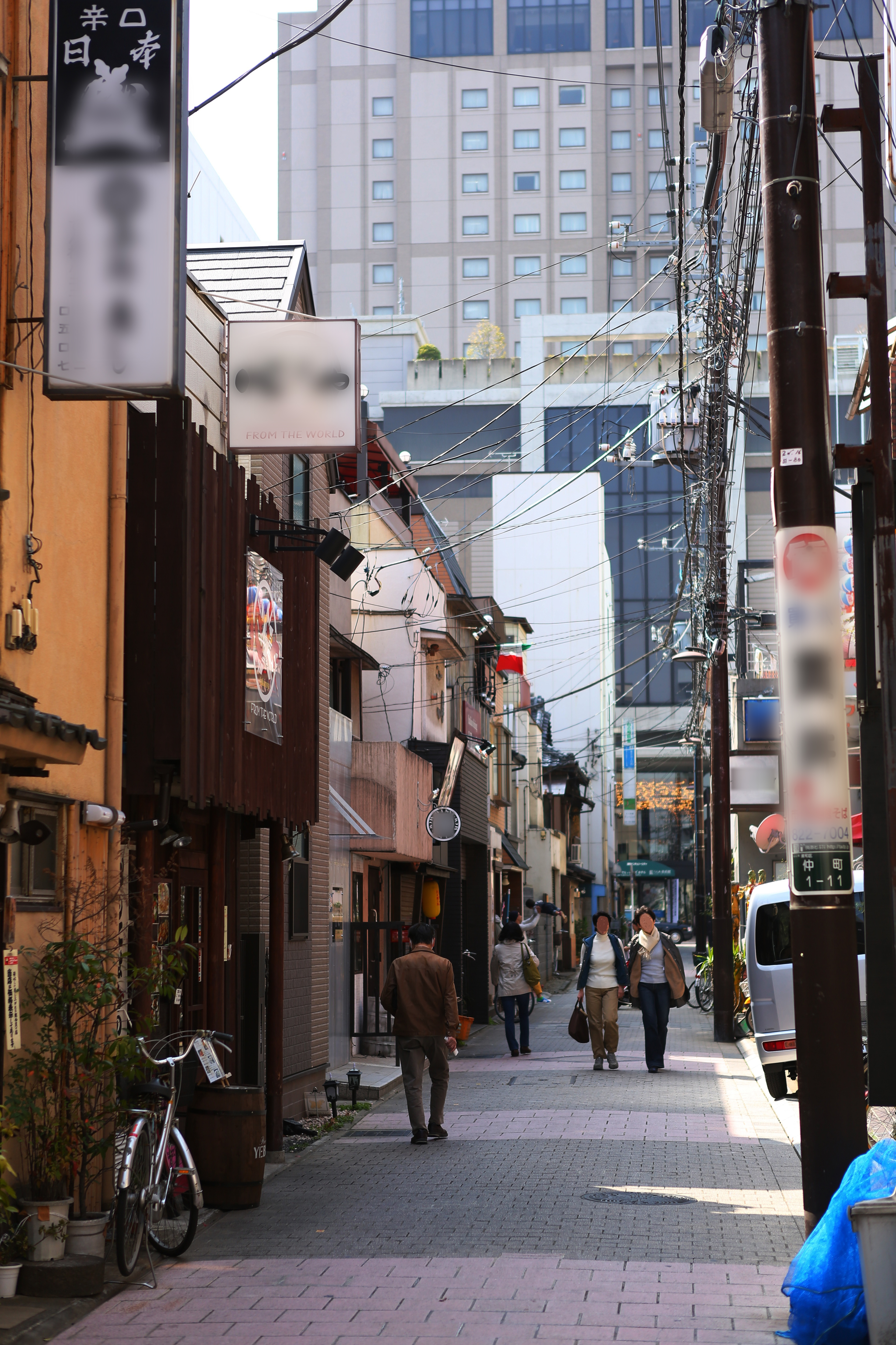 浦和区の仲町平和通り